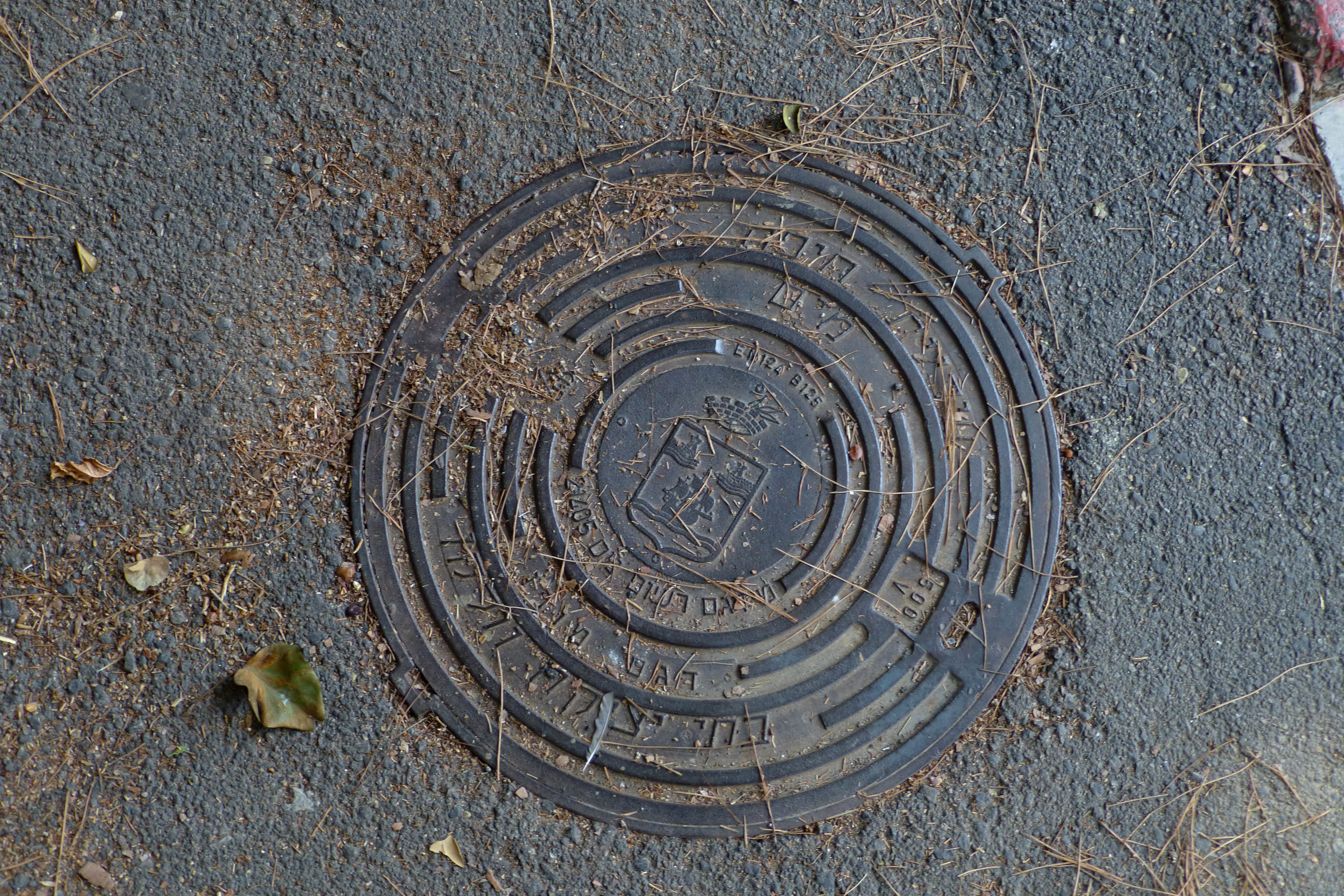 מרכז הכרמל, חיפה מכסה ביוב עם סמל עריית חיפה